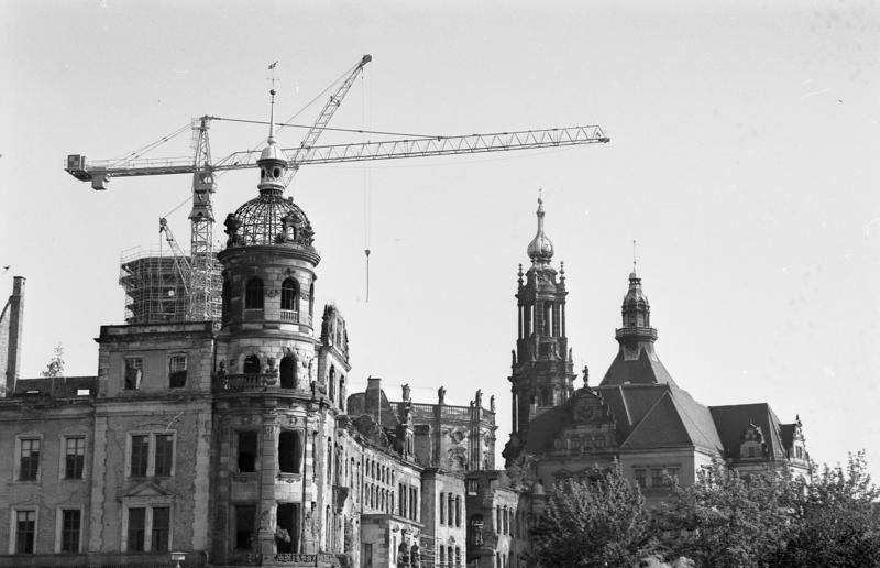 7.7.1991 Stadtansichten Dresden Baustelle Schloß Dresden